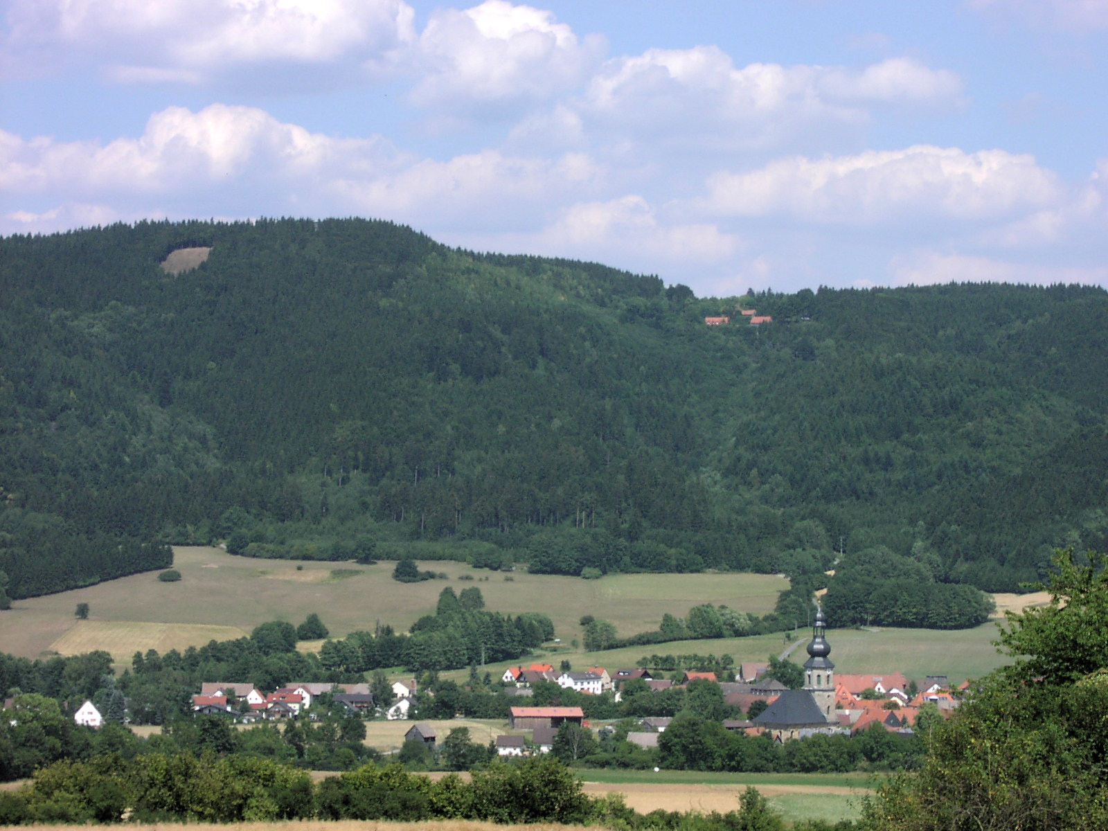 Blick auf die Radspitze im Frankenwald